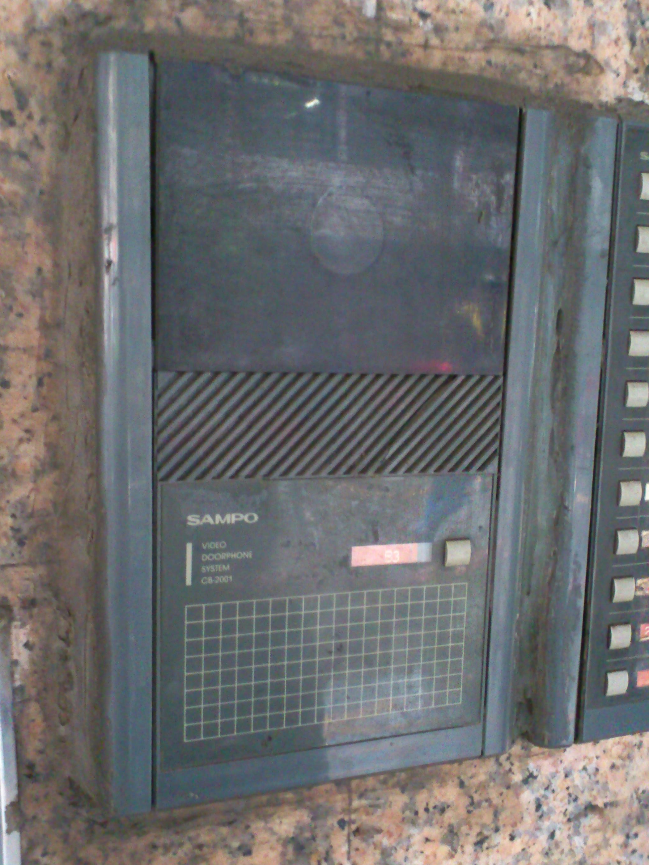 中文（台灣）: 聲寶視訊對講機C8-2001